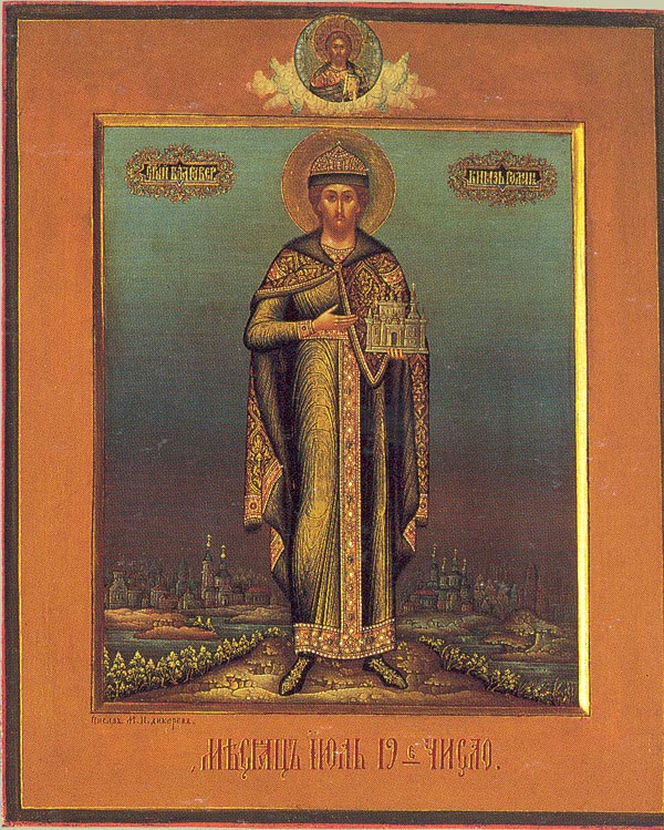 Святой благоверный князь Роман Рязанский. Икона месячной минеи. (Государственный Эрмитаж)